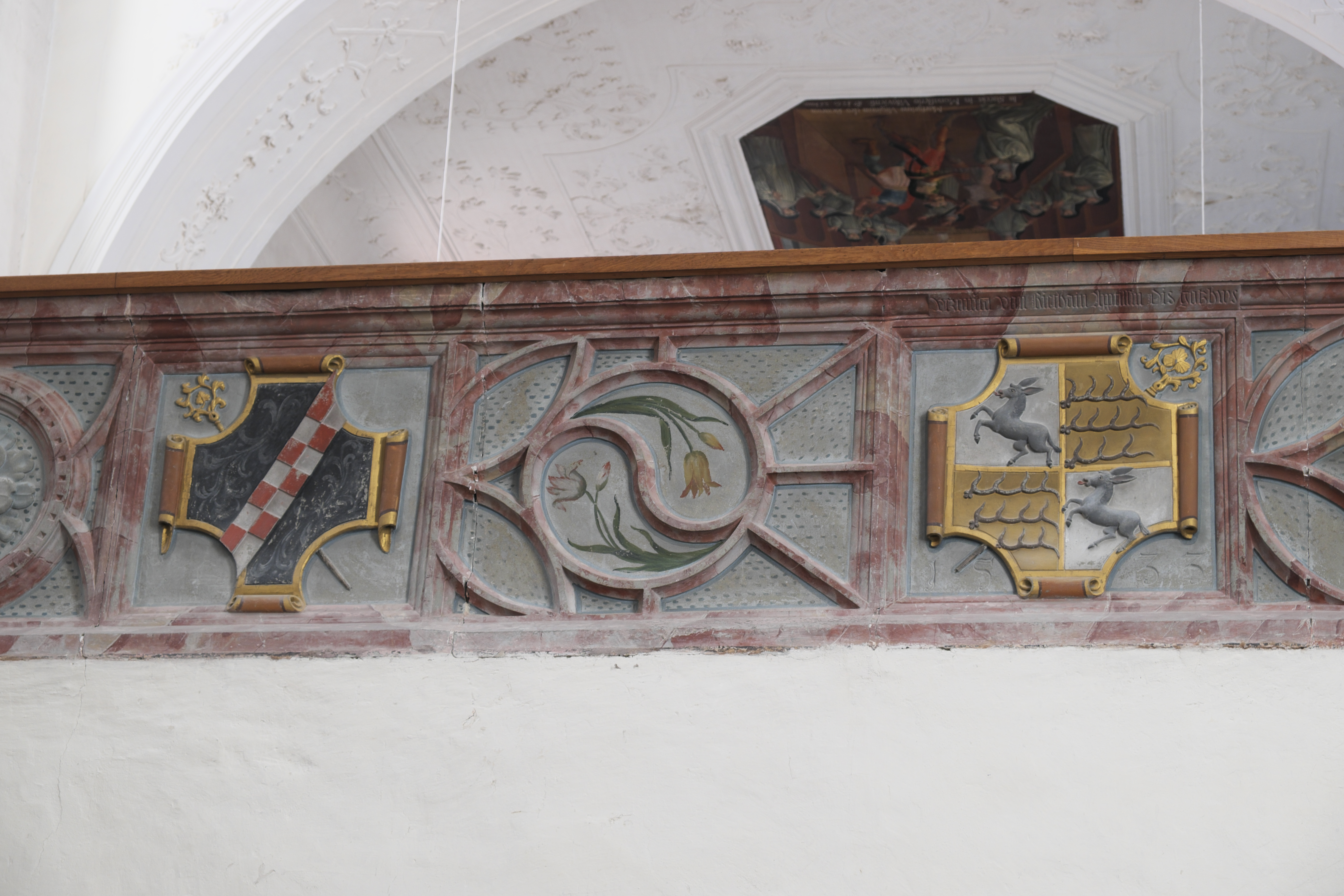 Katholische Pfarrkirche St. Anna, ehemalige Kirche des Zisterzienserinnenklosters in Heiligkreuztal (Altheim) im Landkreis Biberach (Baden-Württemberg/Deutschland), Empore